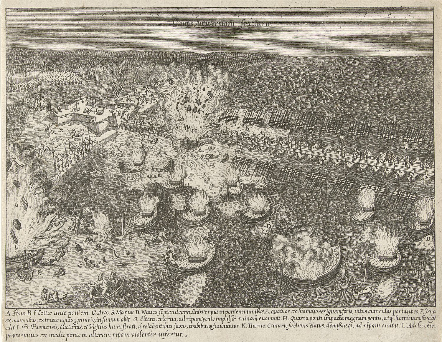 Parma's bridge in Antwerp 1586